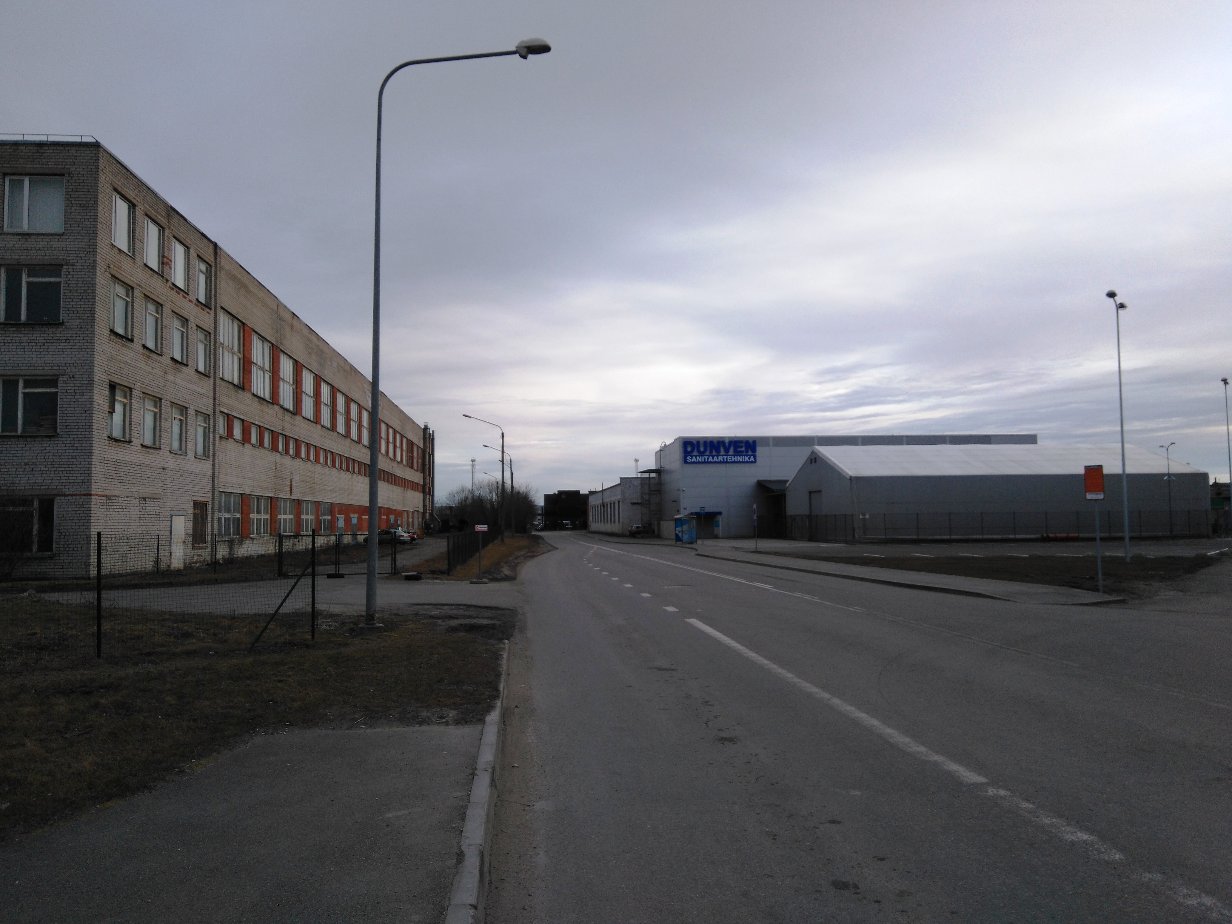 Ääsi tänav Tallinnas.